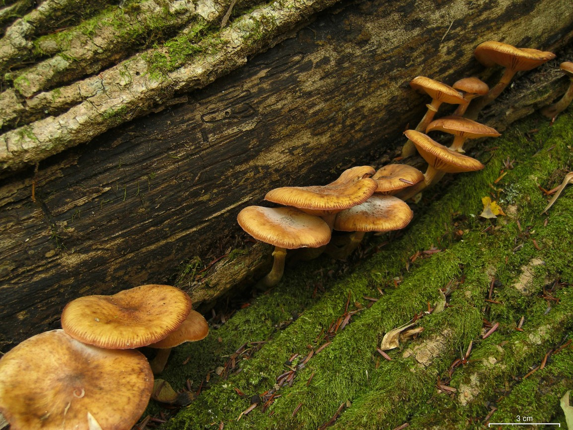 Armillariella mellea 20091007.253 US, MD, Big Run State Park